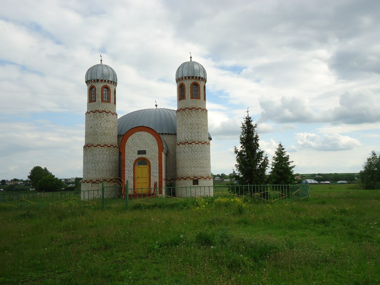 Старый мочалей мечеть